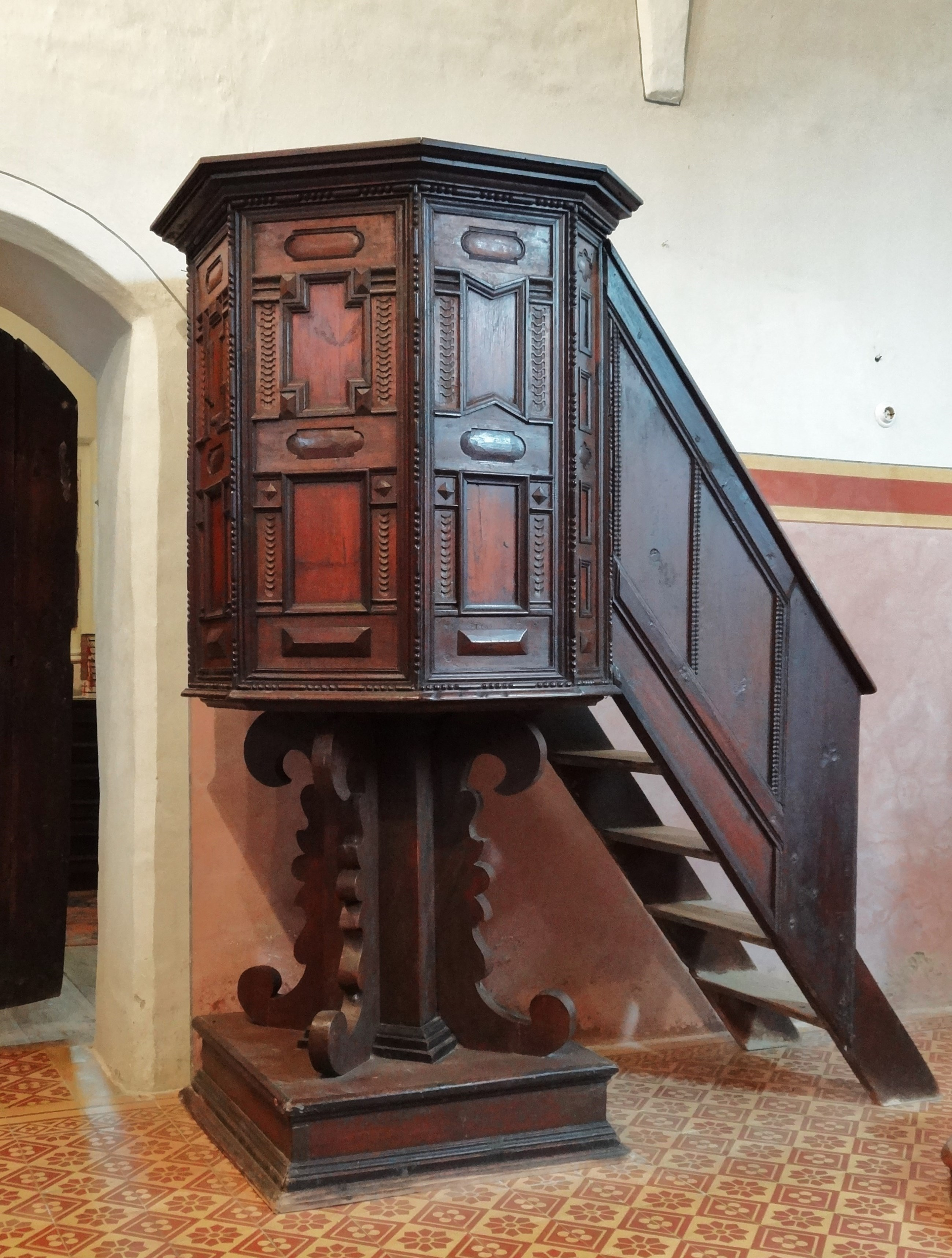 Kath. Filialkirche hl. Johannes der Täufer, die Kanzel